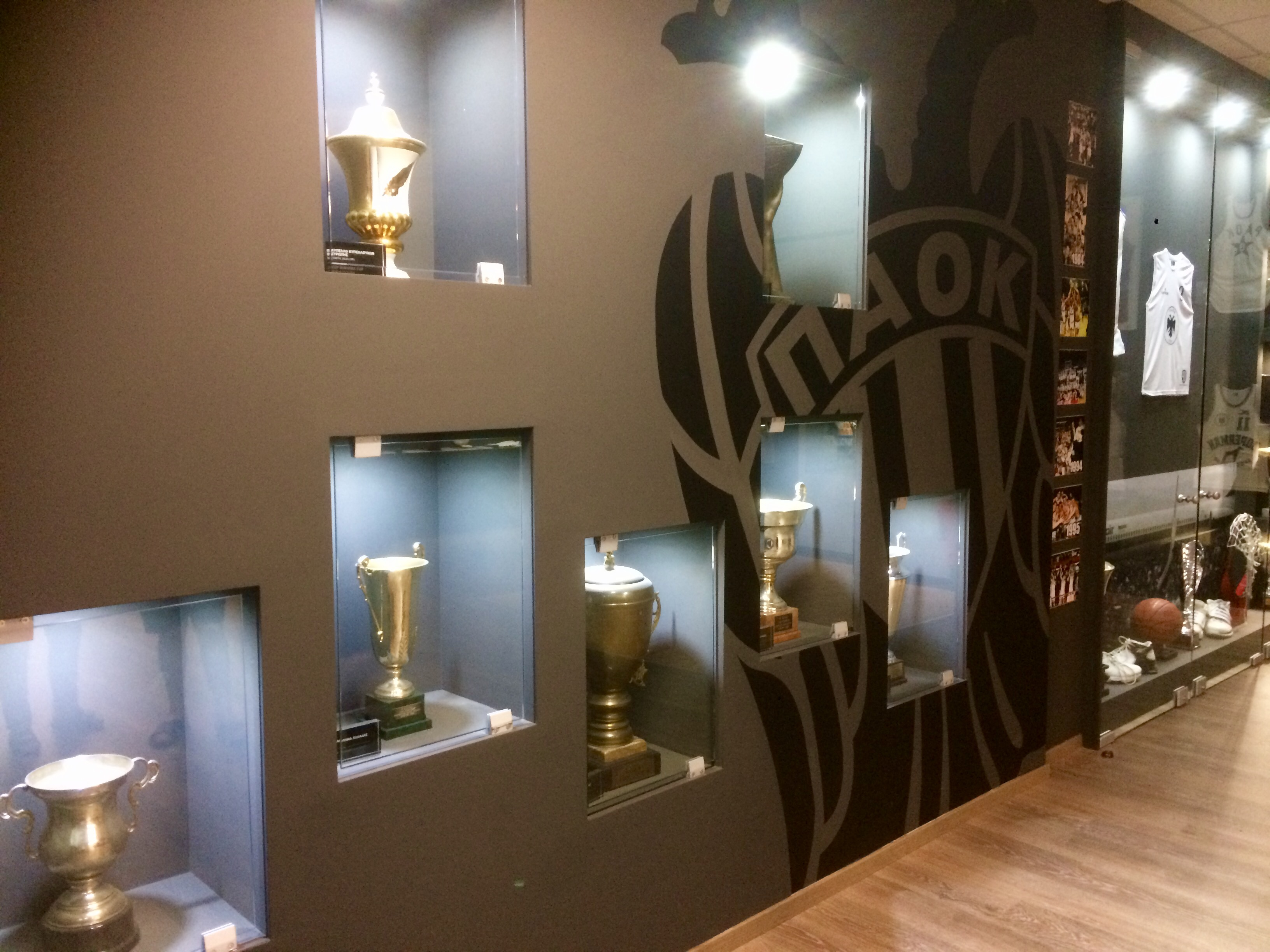 Das PAOK Basketball Museum